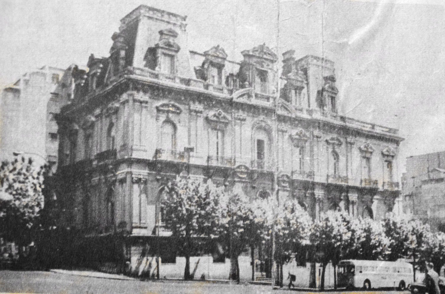 Residencia de la familia Verstraeten-Anchorena, en Juncal y Maipú, demolido completamente en 1969. Buenos Aires, Argentina